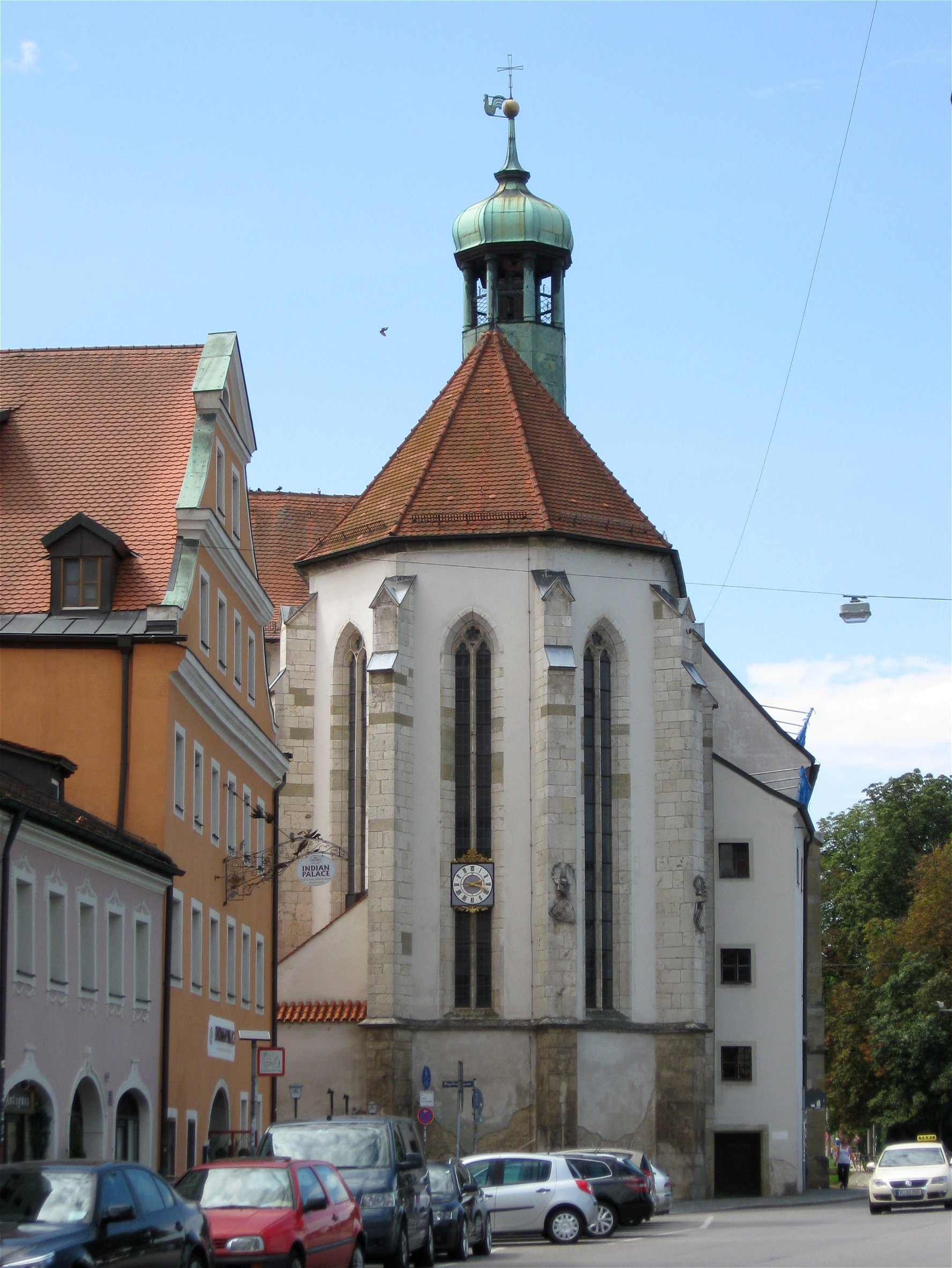 Weißgerbergraben 1; Weißgerbergraben 3. Evang.-Luth. Kirche St. Oswald, ehem. Spitalkirche, Saalkirche mit eingezogenem Polygonalchor, im Kern Ende 13. Jh., Chorneubau 1. Viertel 14. Jh., 1604 erweitert, Barockisierung 1708 und 1750, westliche Vorhalle und Dachreiter 1908 von German Bestelmeyer; mit Ausstattung.